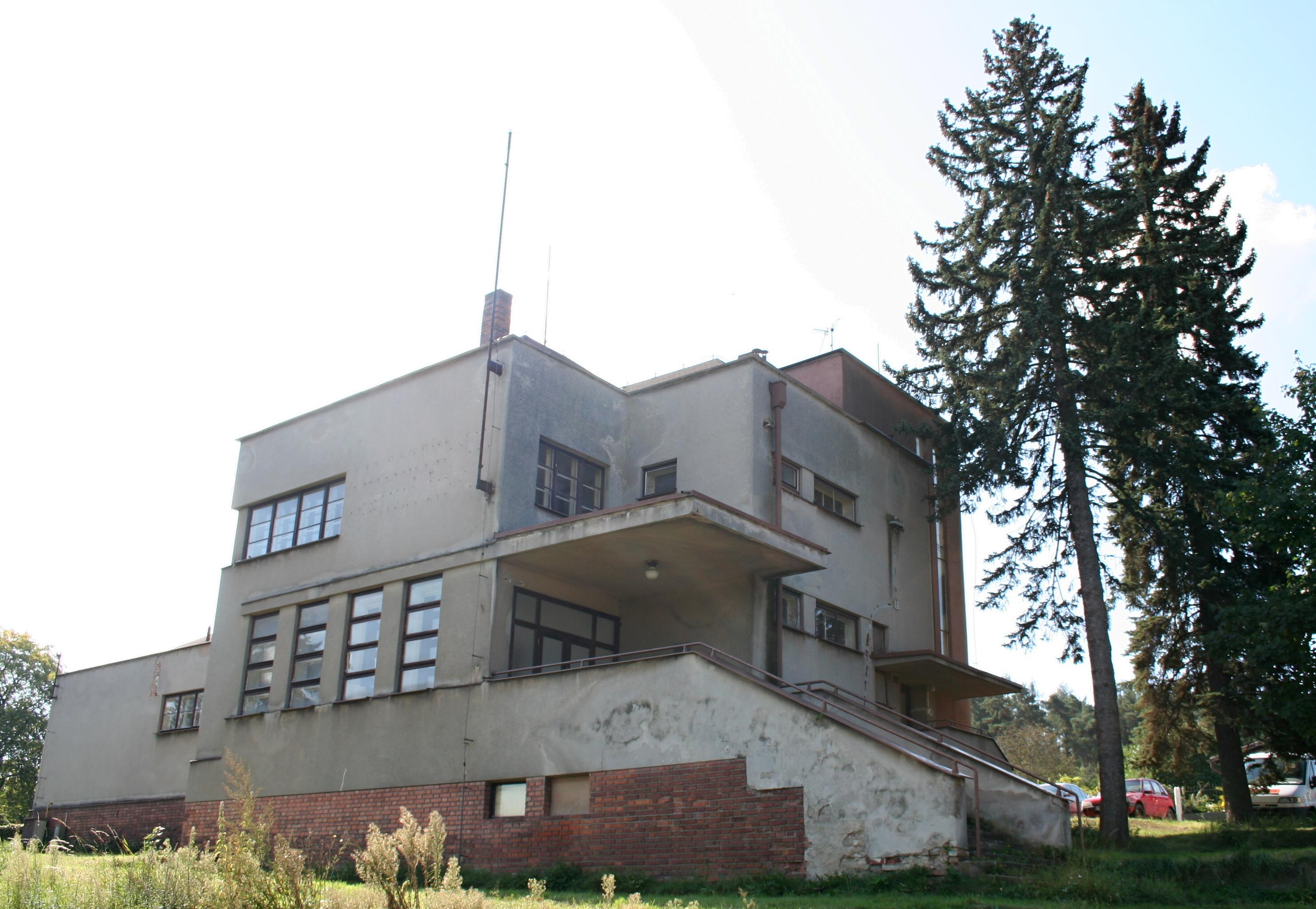 Základní škola (Hornická Čtvrť), Hornická Čtvrť 124